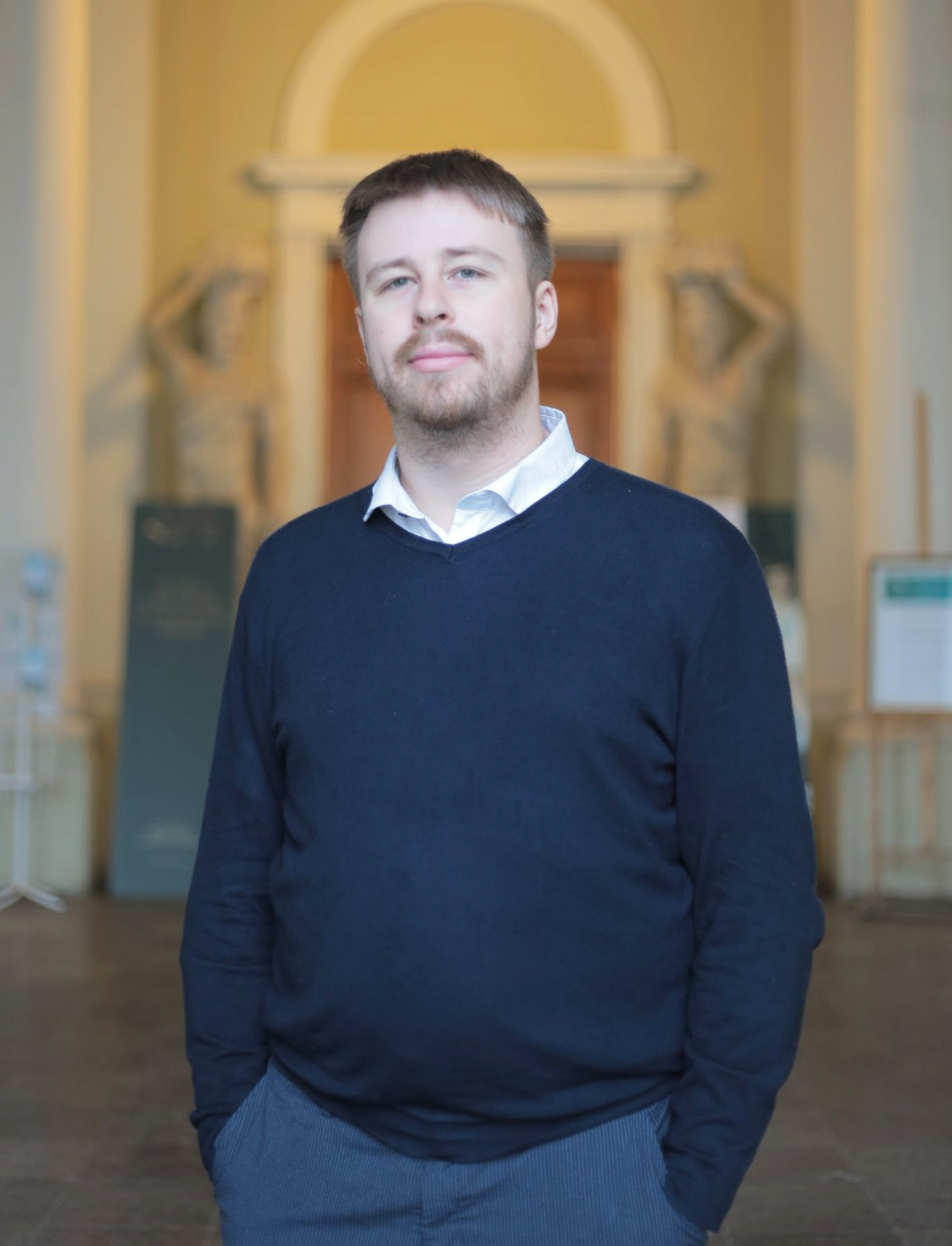 Петр Баранов